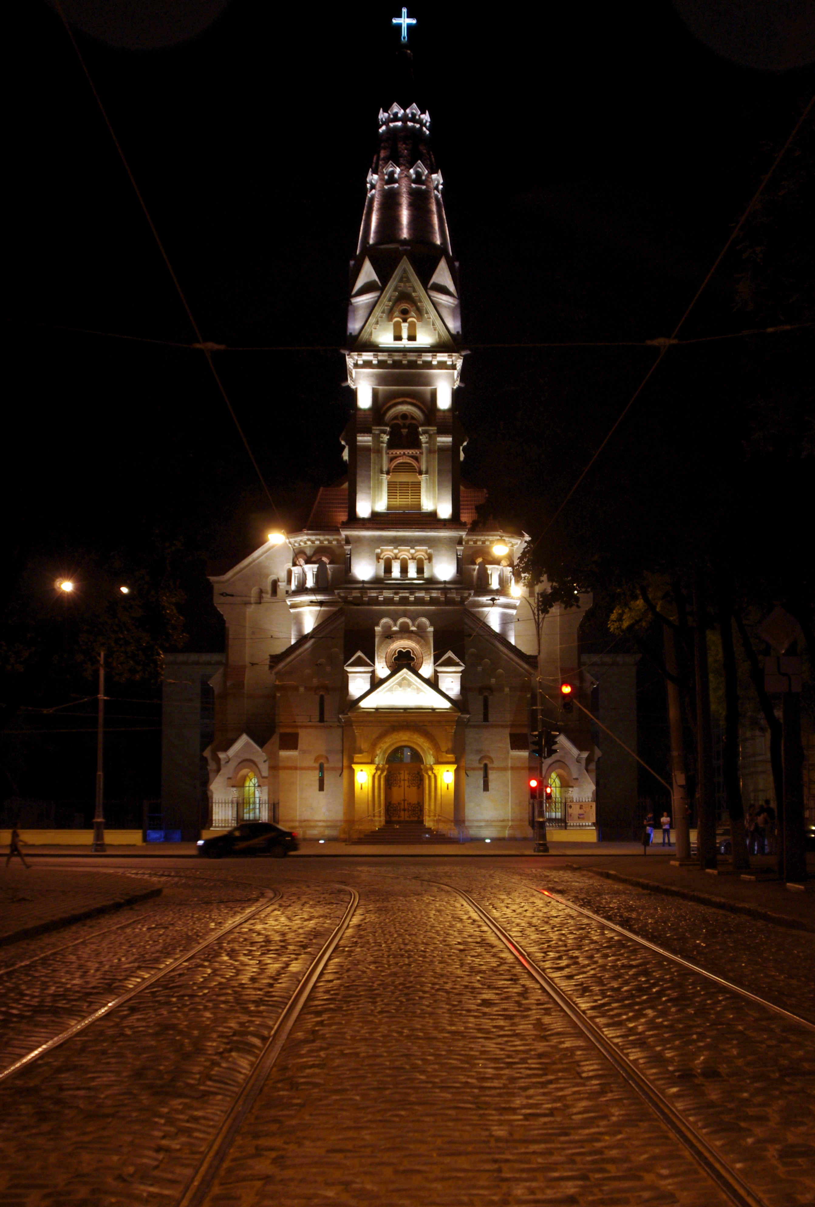 Будинок Кірхи (Лютеранська церква св. Павла) 1824-1828 рр., 1895-1896 рр.